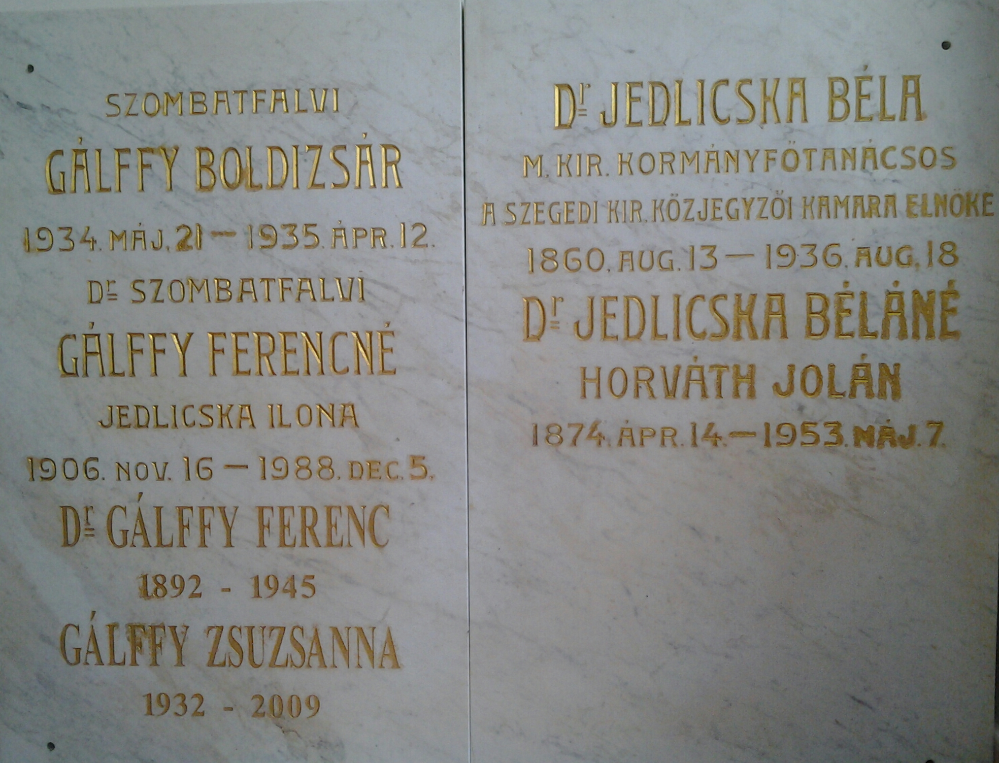 Emléktábla Dr. Jedlicska Béla 1904-1934 között szegedi közjegyző, a szegedi közjegyzői kamara elnöke, kormányfőtanácsos egykori, szegedi belvárosi temetőben volt sírboltjáról